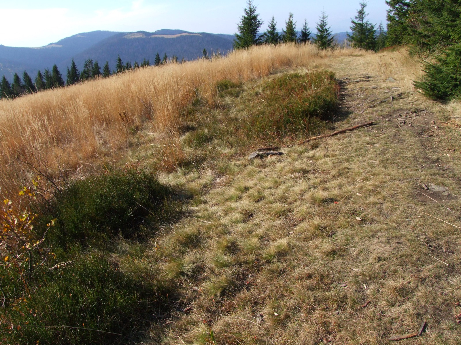 Polana Pustak w Gorcach. W głębi Mostownica i Turbacz